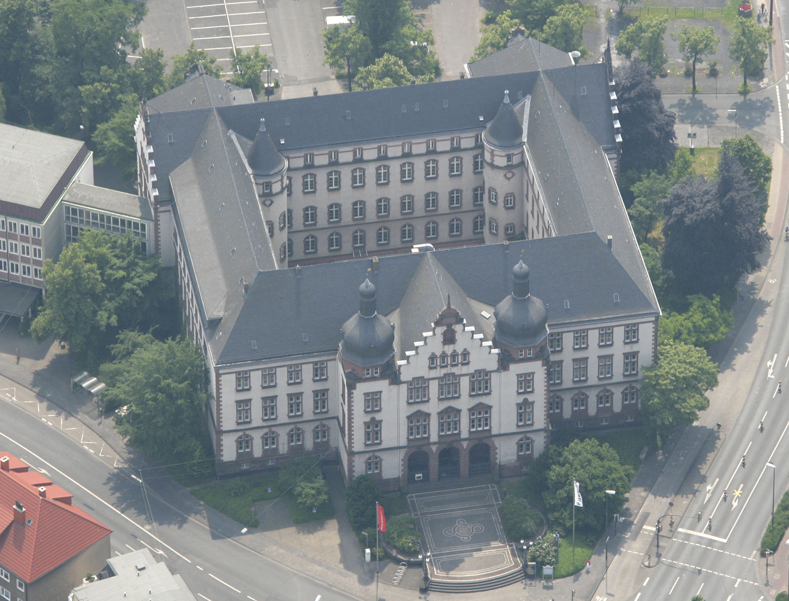 Luftbildaufnahme Hamm